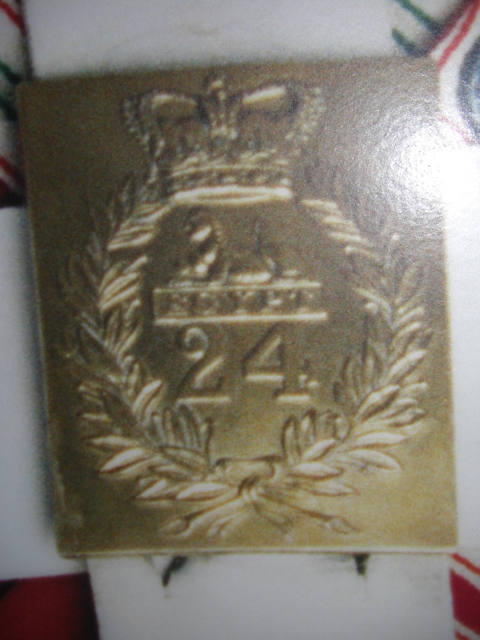 Plaque de torse d'un soldat du 24th Regiment of foot, circa 1840